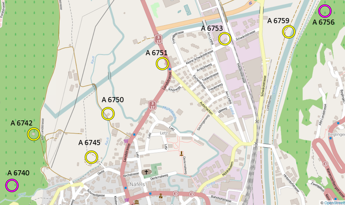 Tankgraben aus dem Zweiten Weltkrieg, Näfels GL, Schweiz